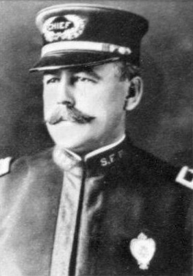 William J. Biggy